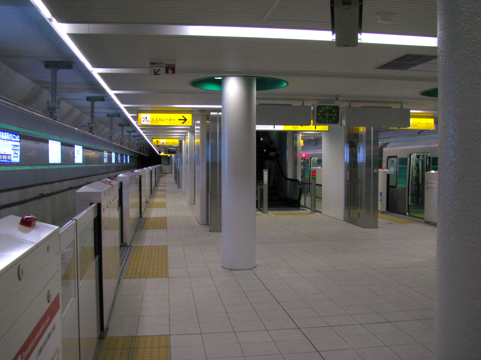 横浜市営地下鉄グリーンライン中山駅